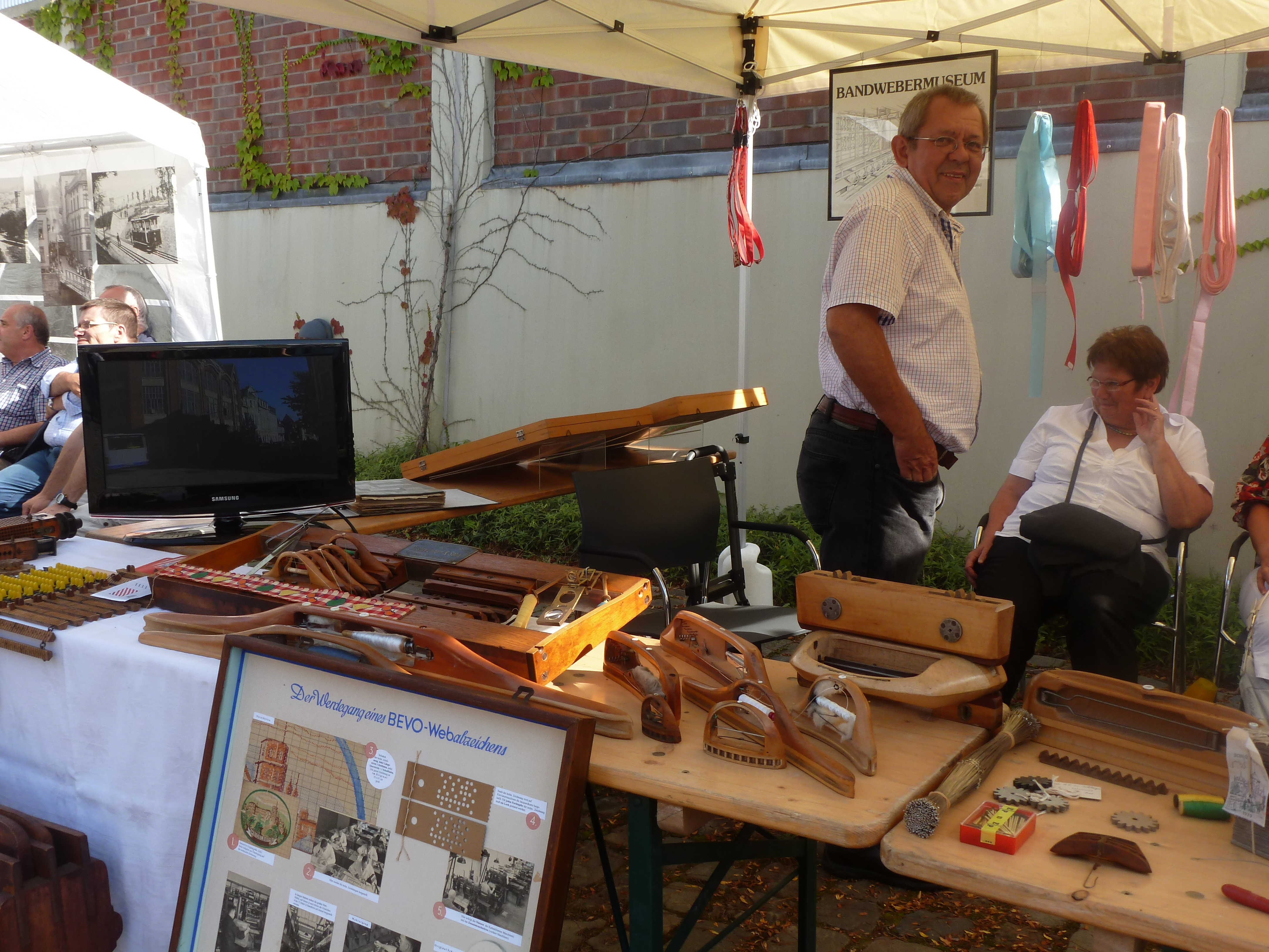 Wuppertaler Geschichtsfest 2012 im Historischen Zentrum